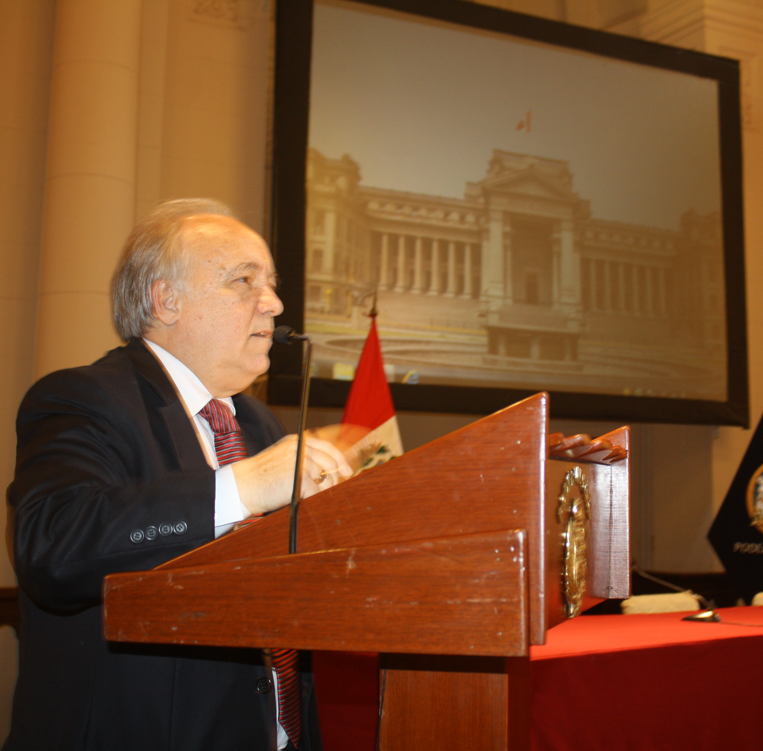 Exposición de Julián Palacín Fernández sobre el régimen jurídico de los accidentes de aviación civil a nivel internacional en la Sala de Juramentos del Palacio de Justicia de Lima